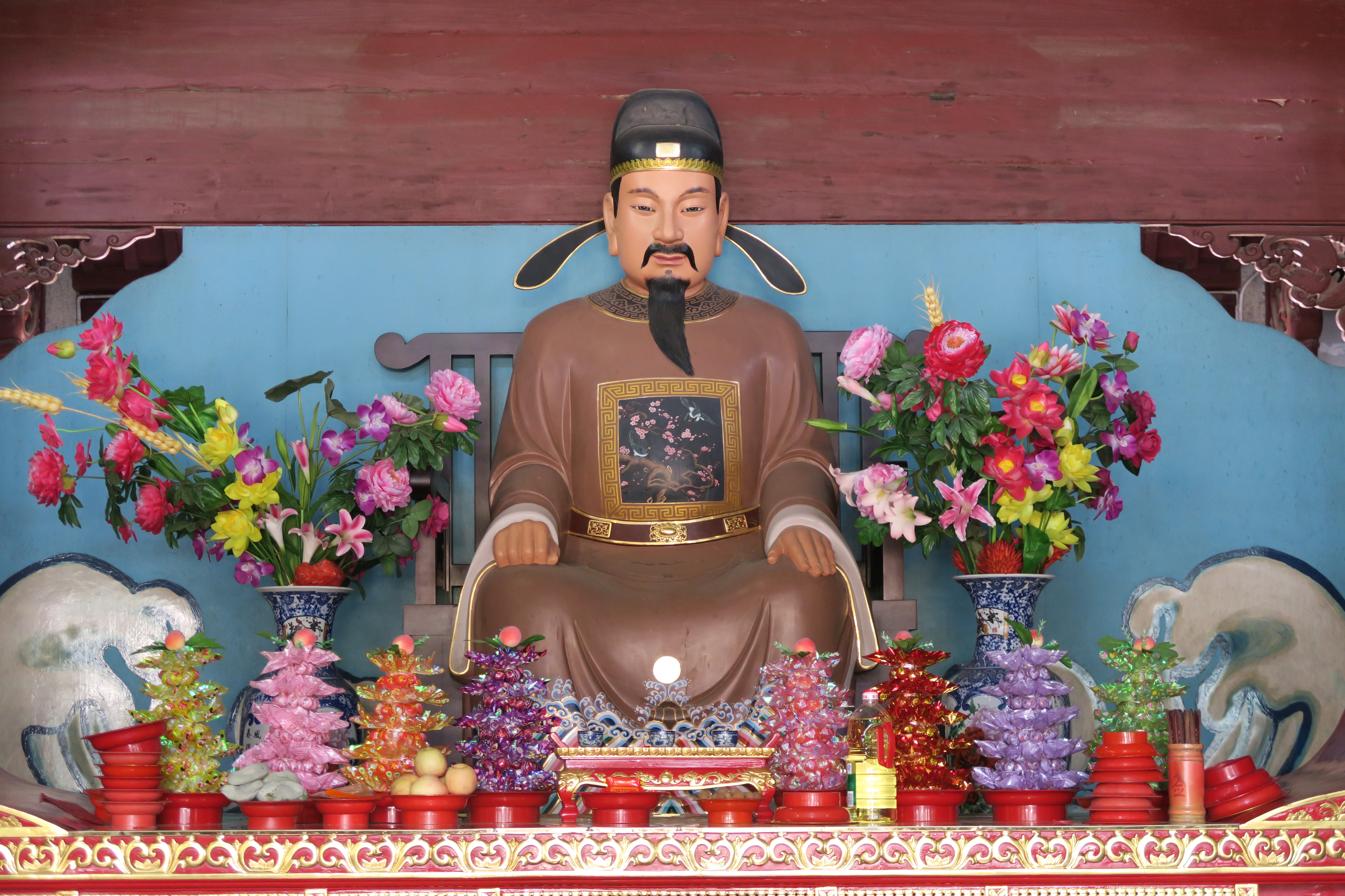 宁波鄞江它山遗德庙